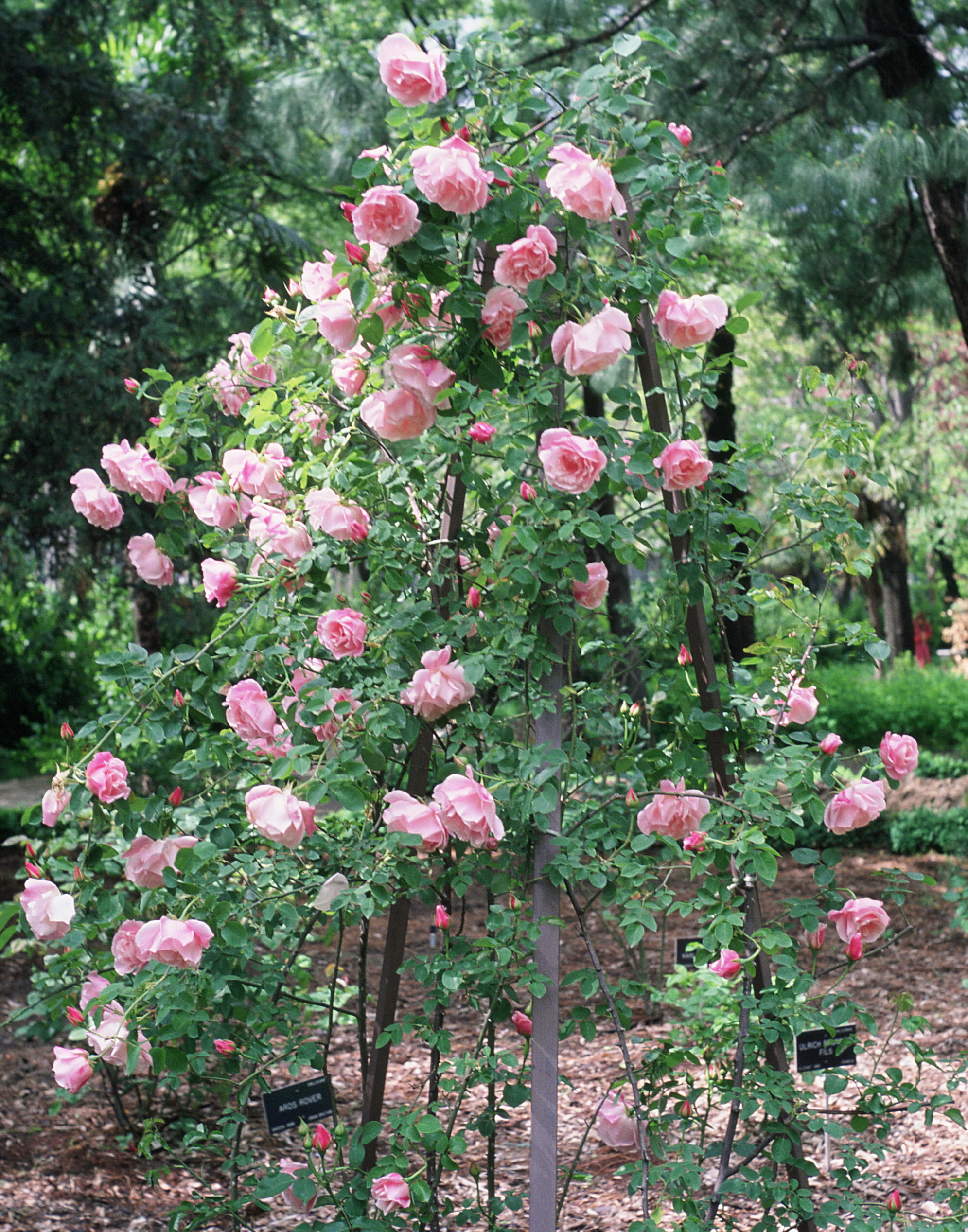 Rosa 'Mme Grégoire Staechelin' (='Spanish Beauty'), gr. Híbridos de te, sect. Chinensis. Real Jardín Botánico de Madrid.